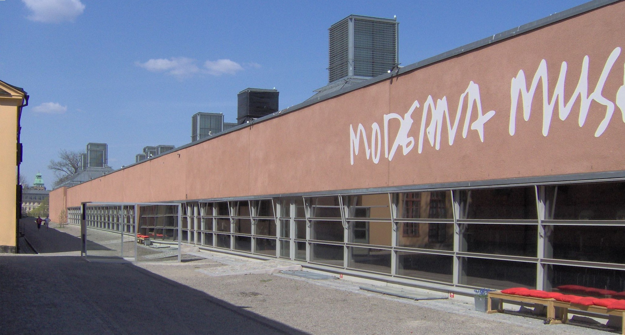 Moderna museet i Stockholm, Sweden. 2006